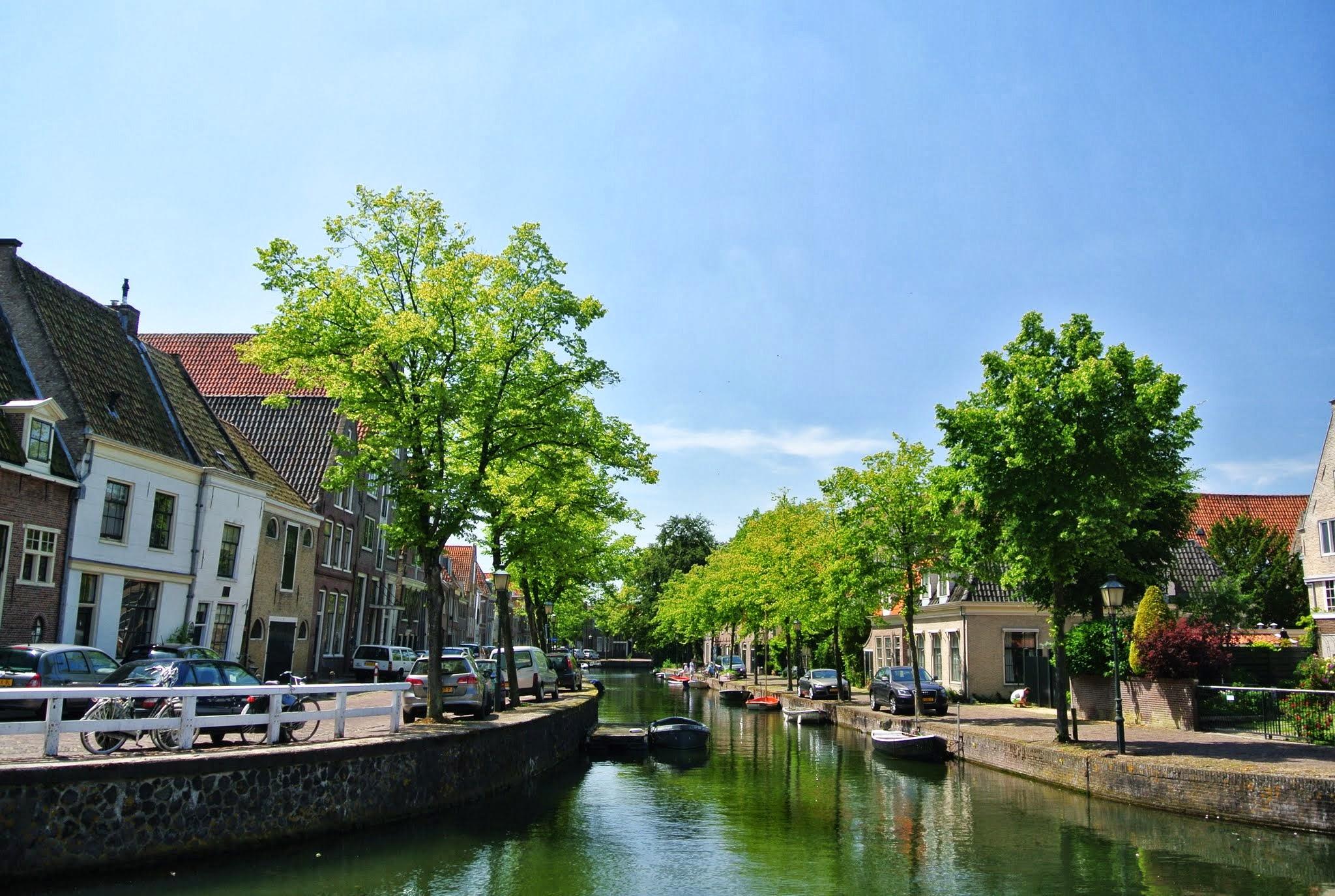 Binnenstad Hoorn, 1621 Hoorn, Netherlands